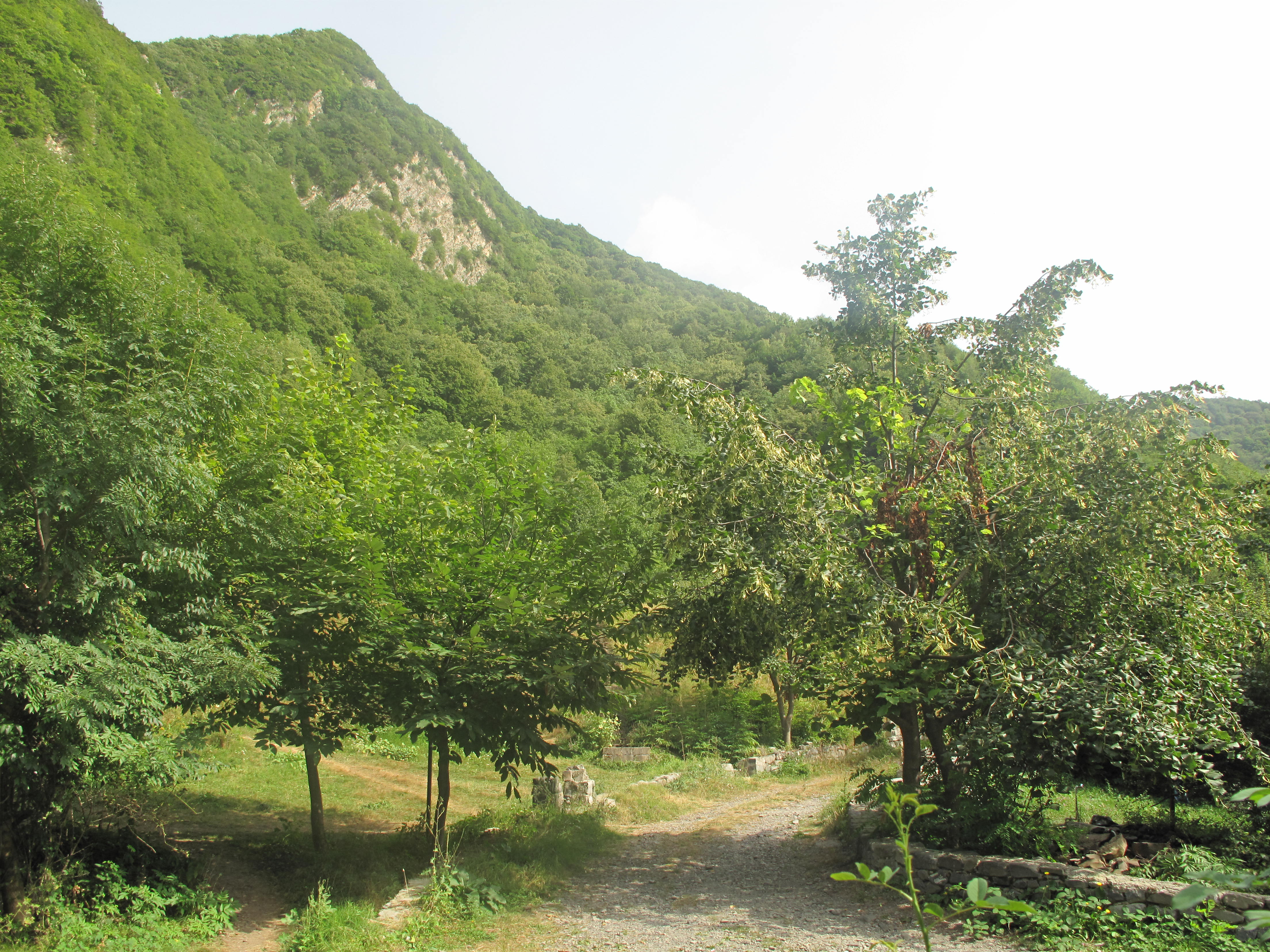 Qax rayonu ərazisi